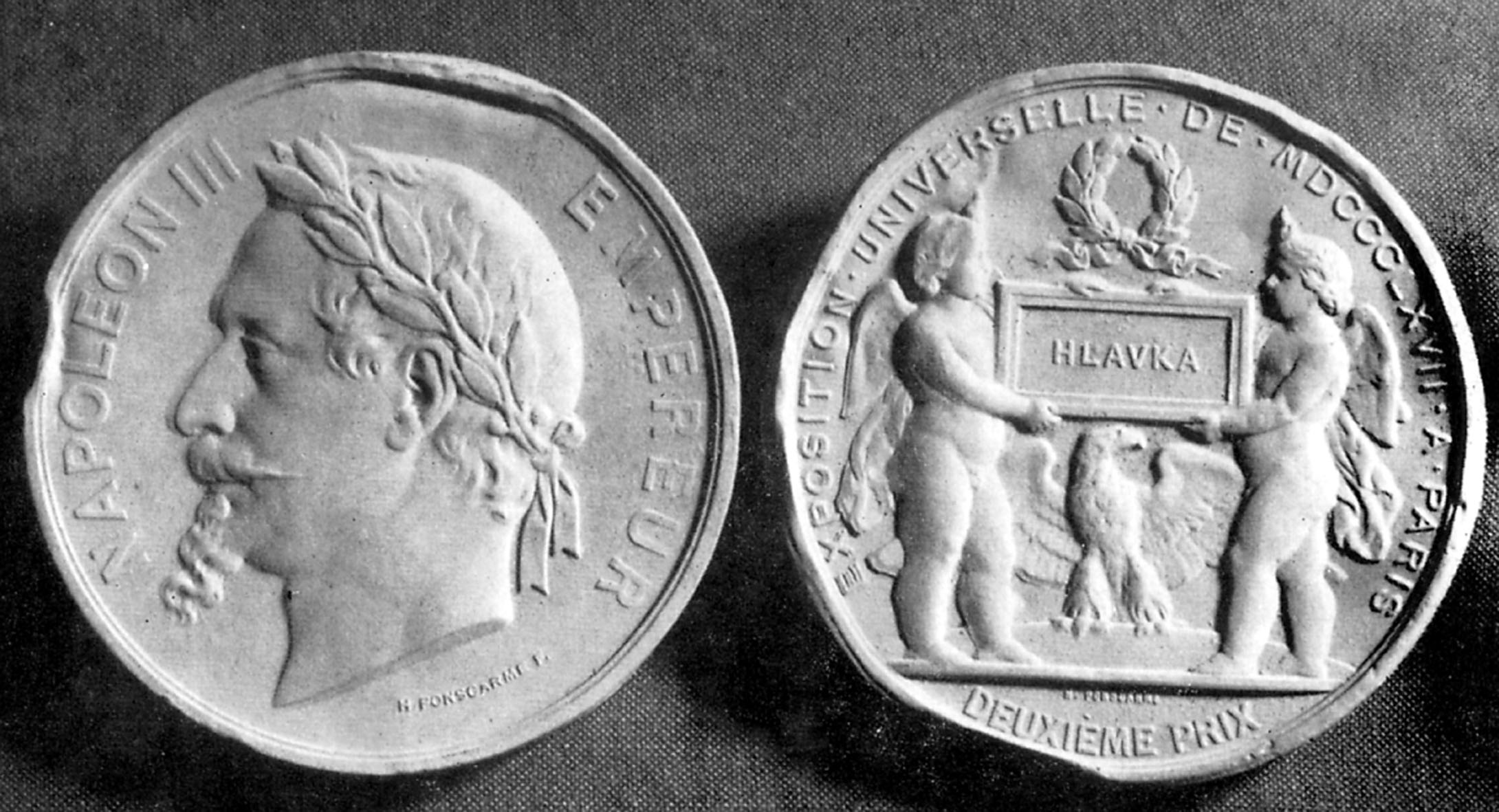 Medaile II. ceny v oboru architektury na Světové výstavě v Paříži 1867